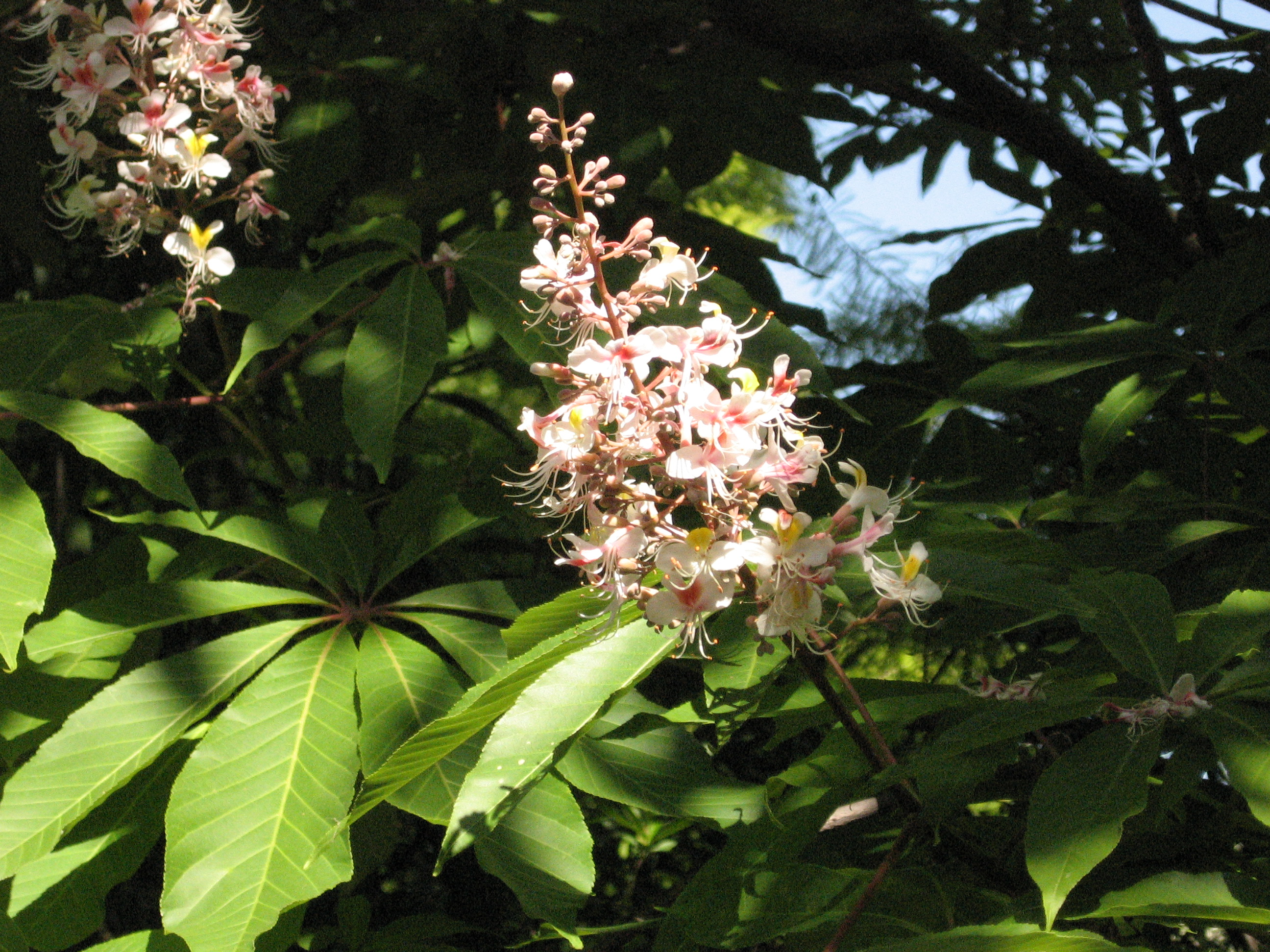 Aesculus indica. Real Jardín Botánico, Madrid